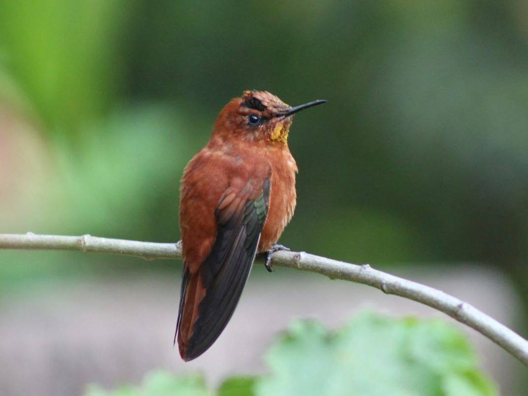 Especie endémica del Parque nacional Archipiélago de Juan Fernández, Picaflor macho de color rojo.